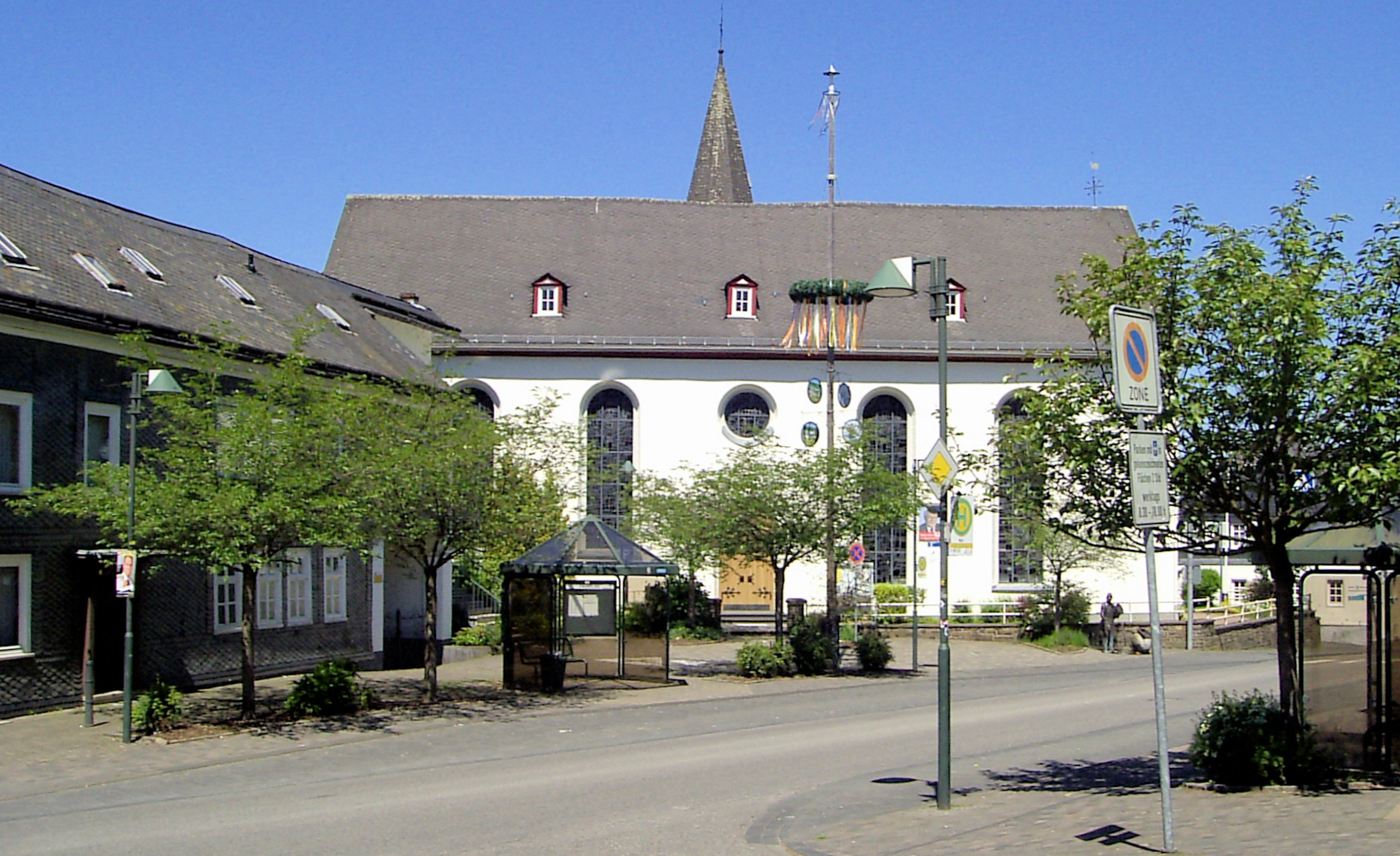 evangelische Kirche in Niederfischbach, Landkreis Altenkirchen (Westerwald), Rheinland-Pfalz, Deutschland